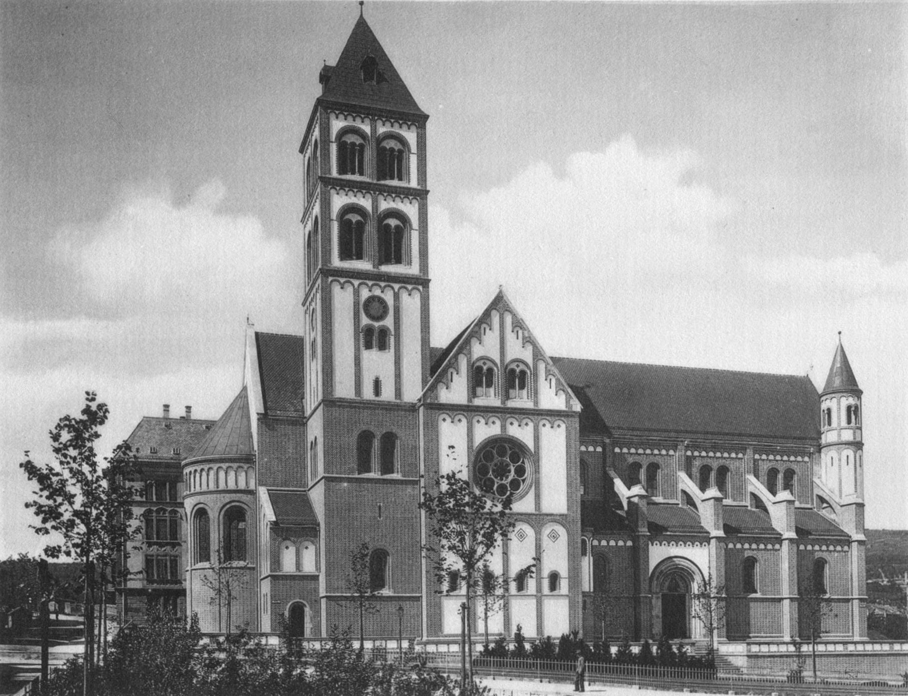 St. Elisabethkirche in Stuttgart, 1901.